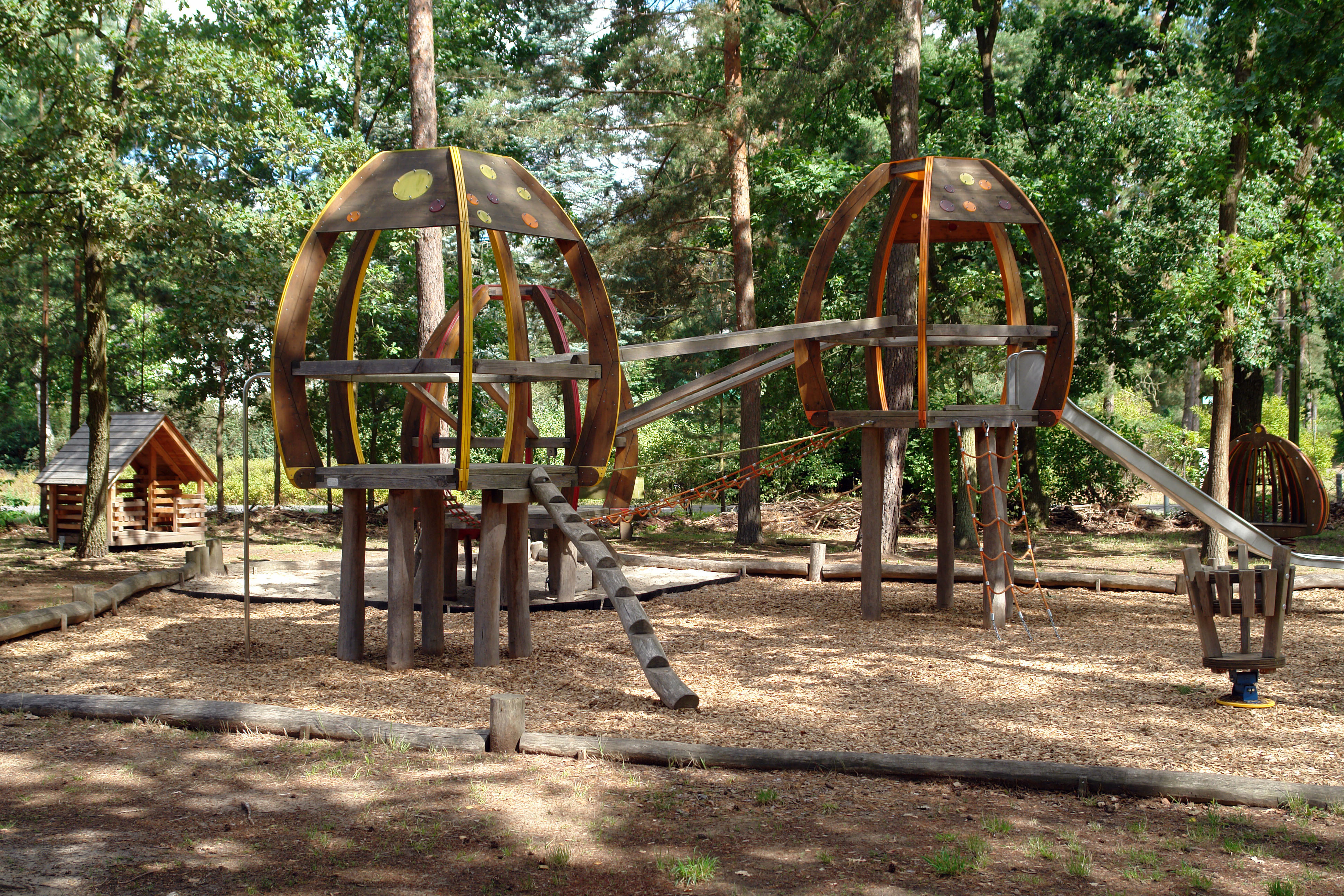 Birkholzaue, der Kinderspielplatz "Am DrEi-Eck" zwischen Ahornallee, Alte Bernauer Landstraße und Beethovenstraße.